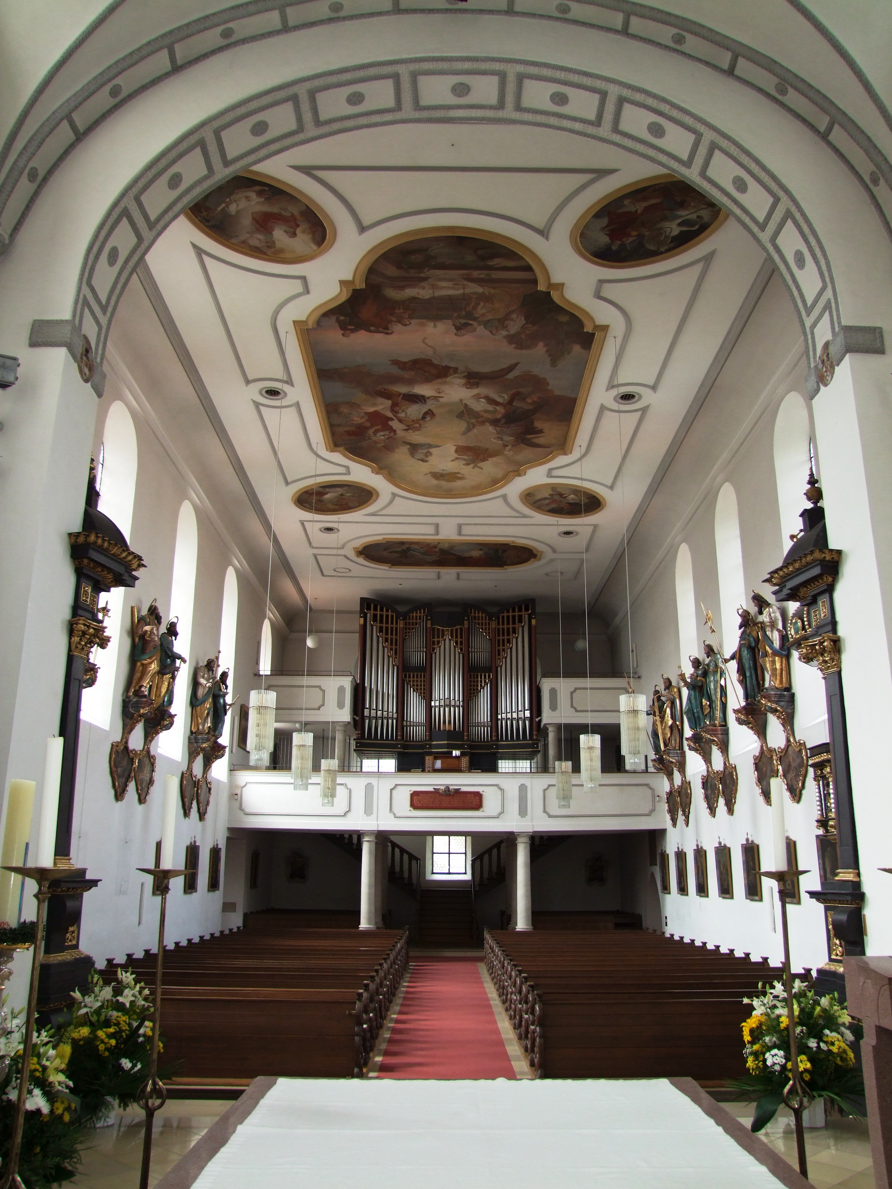 Kirchenschiff von St. Martin (Illertissen)